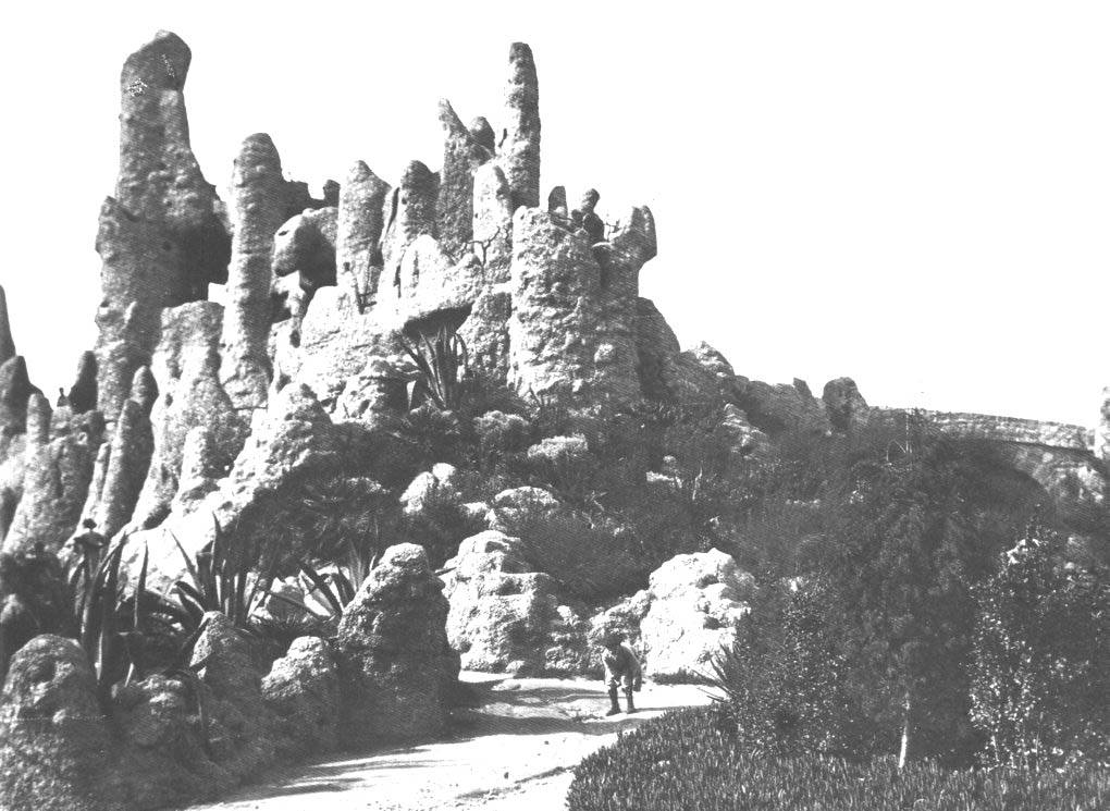 Réplica de la montaña de Montserrat, parque de la Ciudadela (1895).